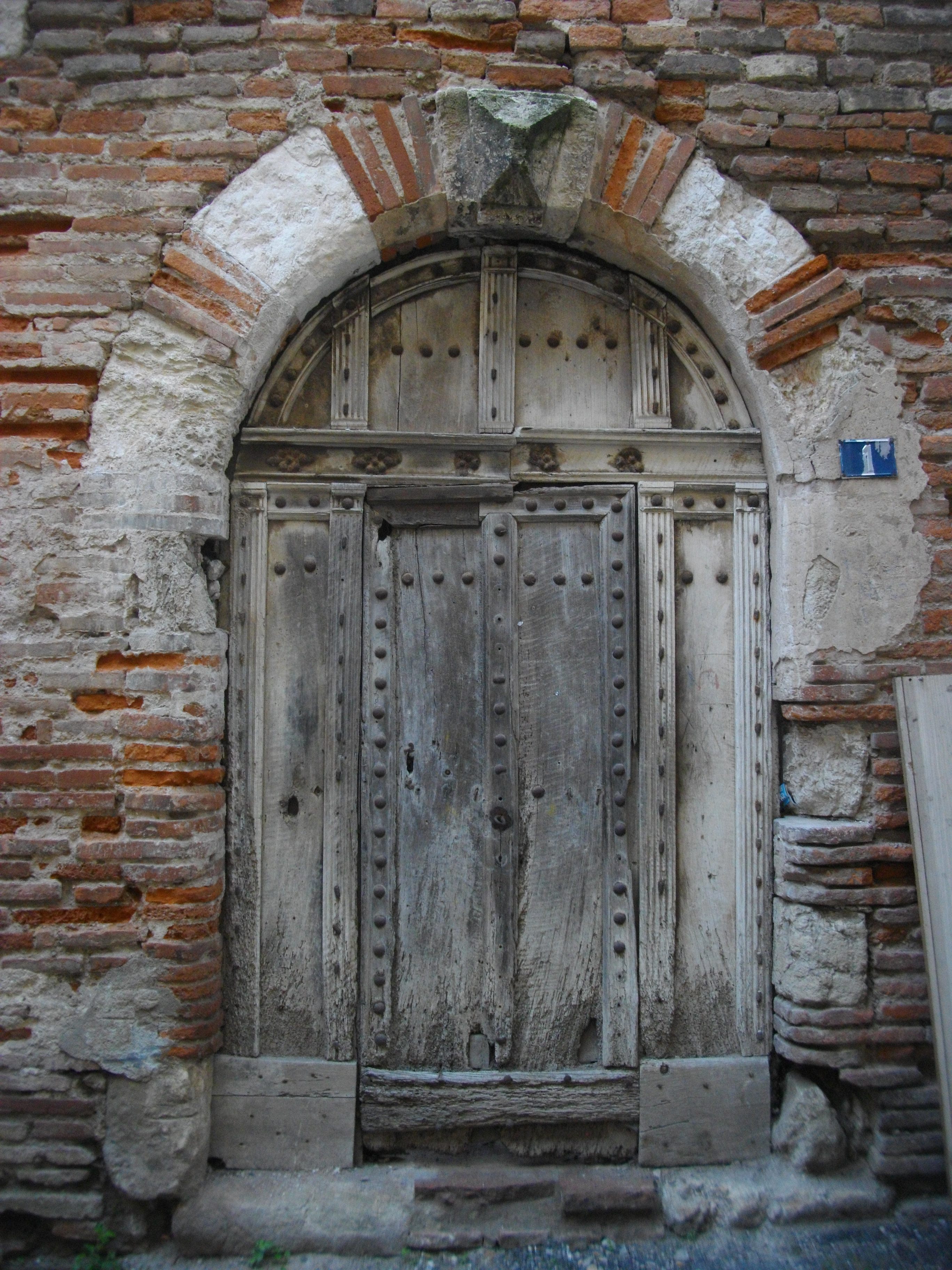 Vielle porte en bois cloutée. Encadrement alternant la brique, la pierre calcaire et le grès rose sur le seuil.